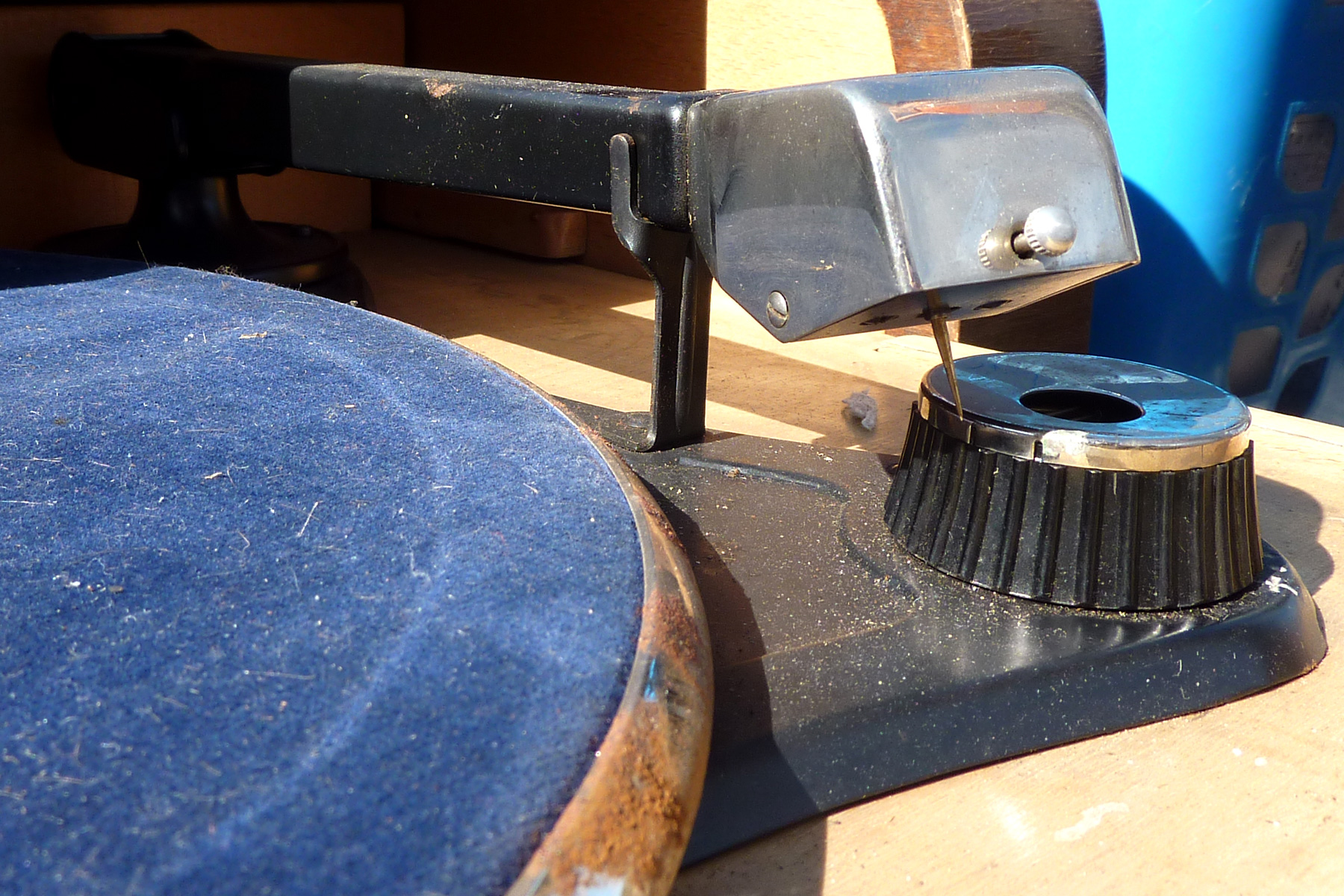 Dual Tonabnehmer mit Stahlnadel für Schellackplatten